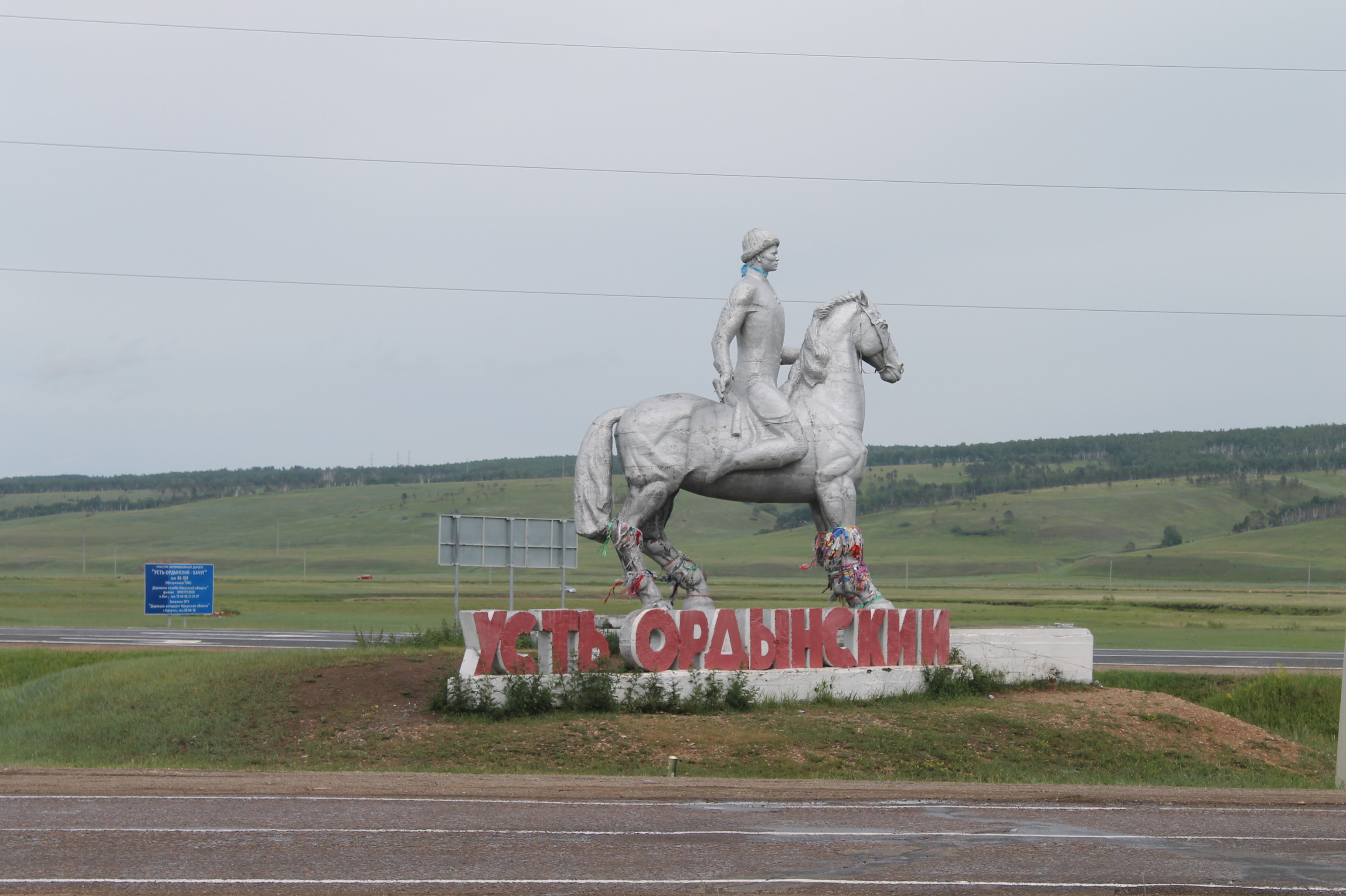 Усть-Ордынский